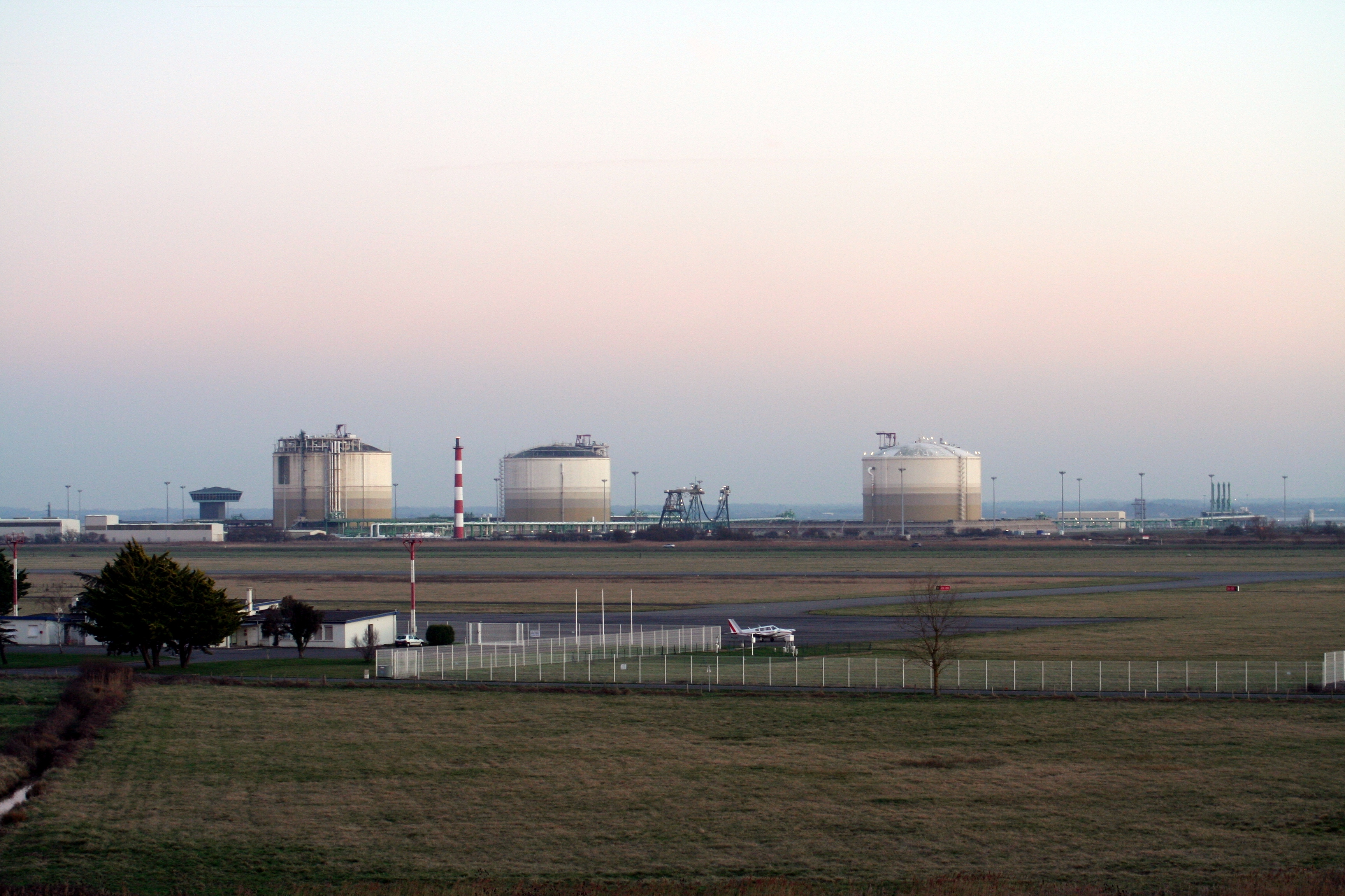 Terminal Méthanier et Aéroport de Montoir